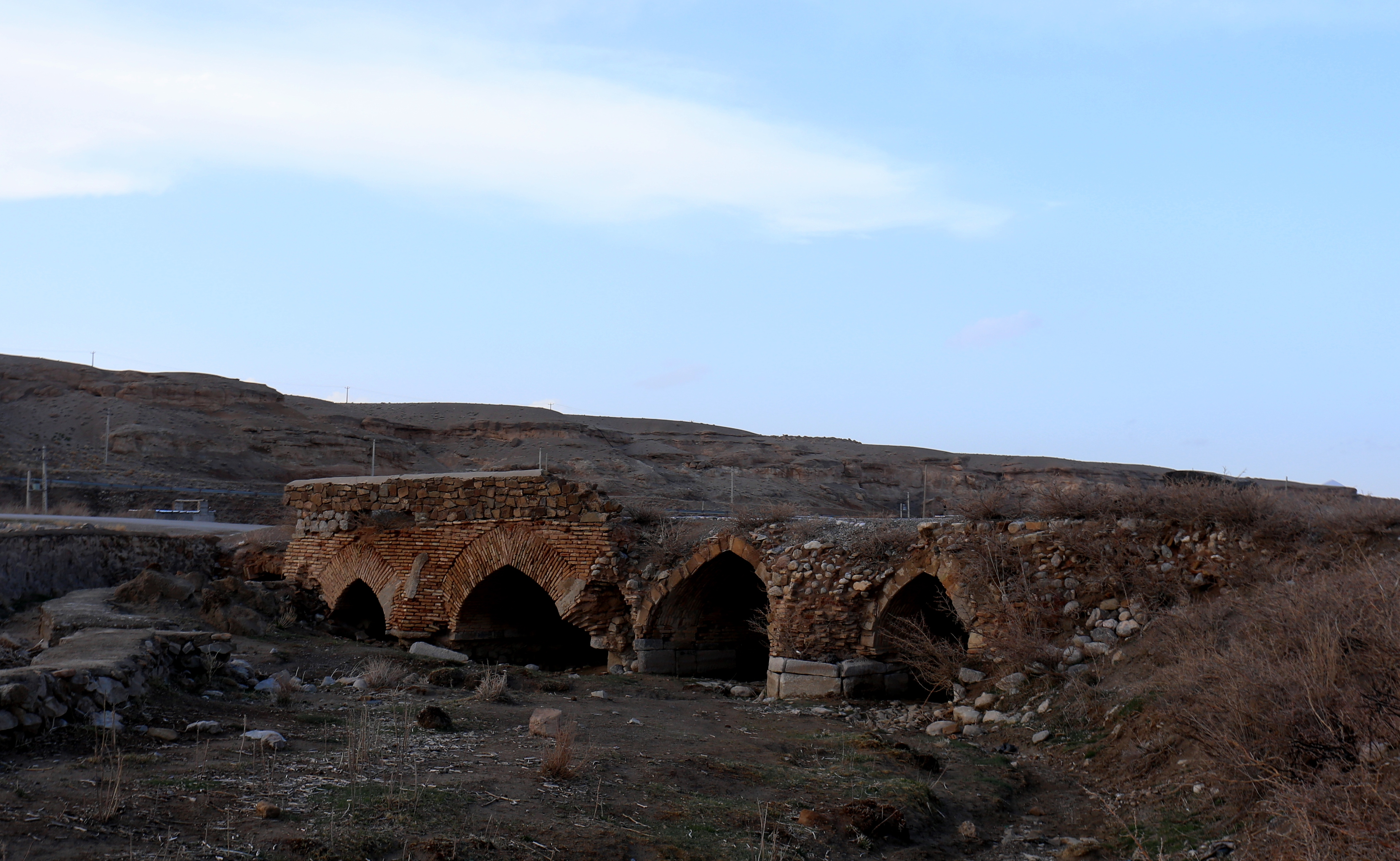 پل ایزد خواست